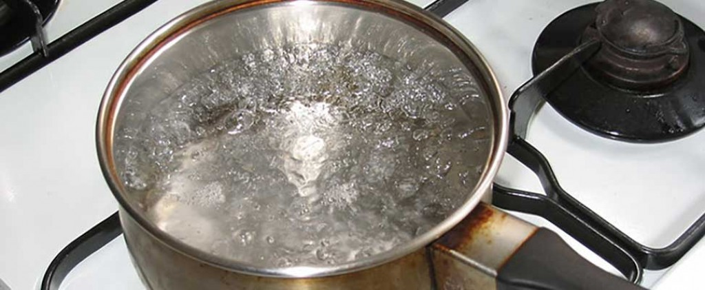 vapor1